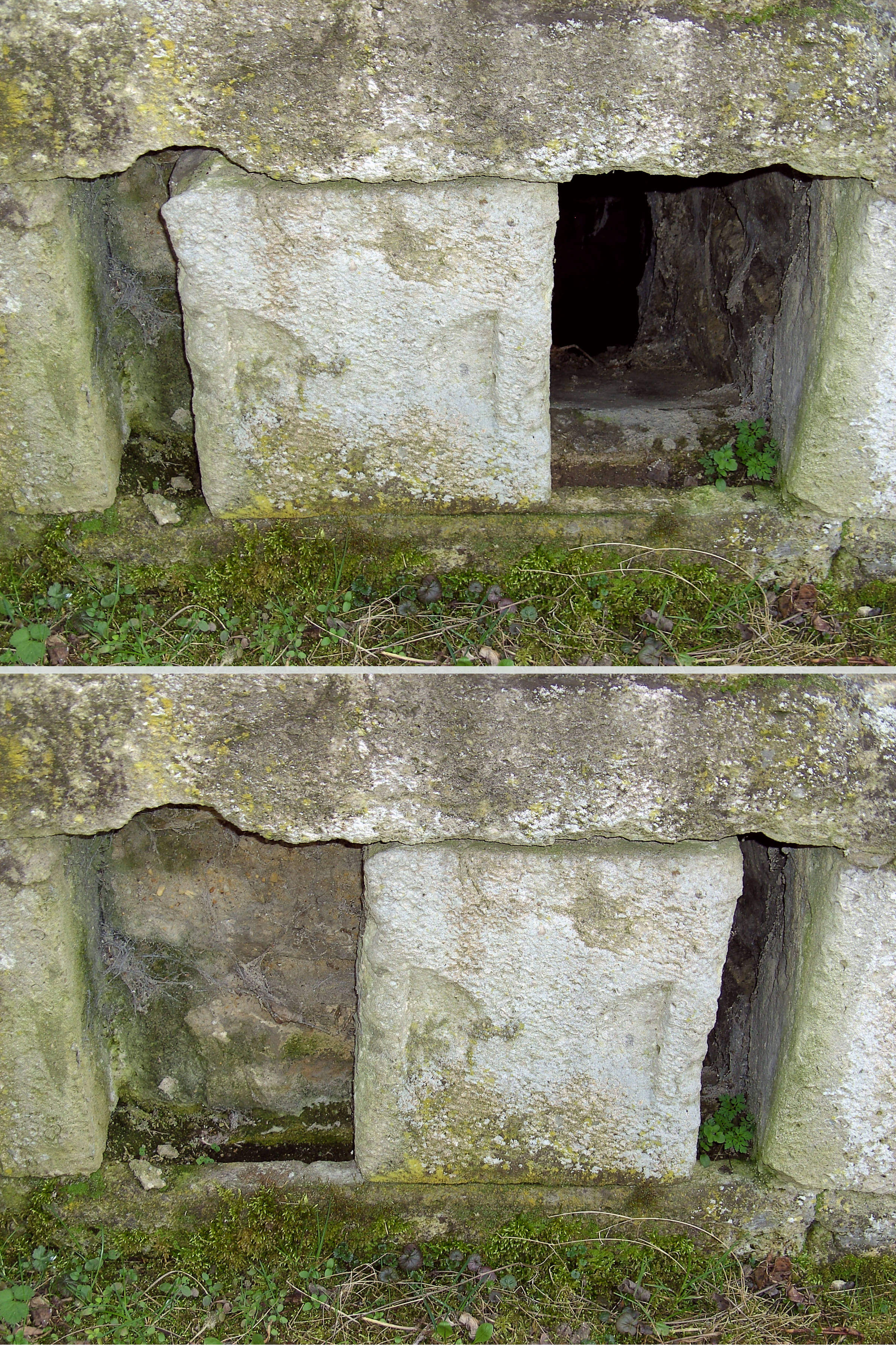 Schiebefenster zur Gewölbekellerbelüftung